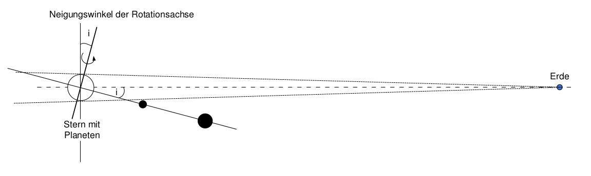 Der Blickwinkel sowie die Entfernung des Planeten und unserer Beobachtungsposition können die Entdeckung von Planeten verhindern. Bereits bei einer Neigung der Rotationsachse des Sterns von 5 Grad in Richtung zur Erde liegen Planeten mit einem Abstand von 15 Mio. km (ca. 0,1 AU) vom Stern schon außerhalb des Bereiches, in dem von der Erde aus ein Durchgang zu beobachten ist. Da die Rotationsachsen der Sterne zufällig im Raum orientiert sind spricht die Tatsache, dass trotzdem schon so viele Planeten gefunden wurden dafür, dass Planetenbildung bei der Mehrzahl der Sterne stattfindet.